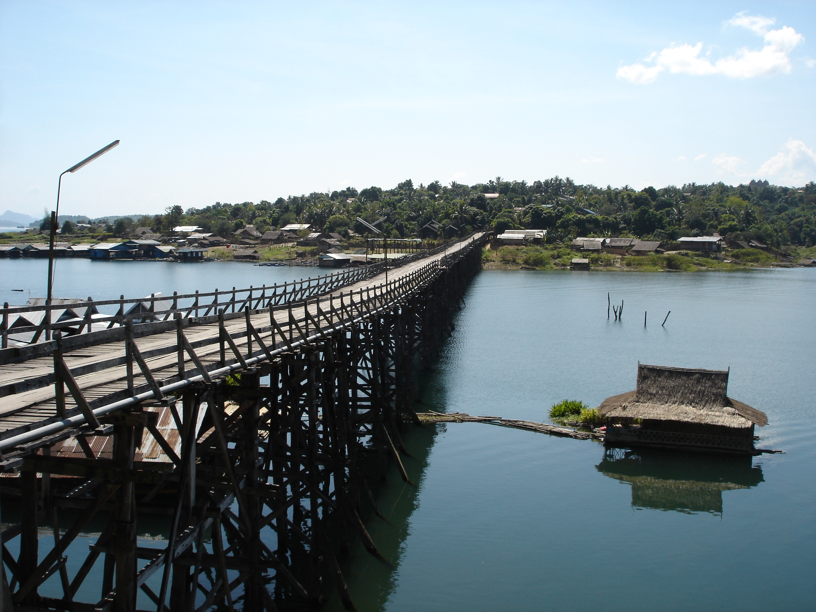 Bridge II, Sangkhlaburi, Thailand